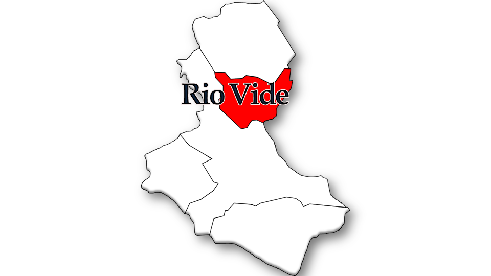 População